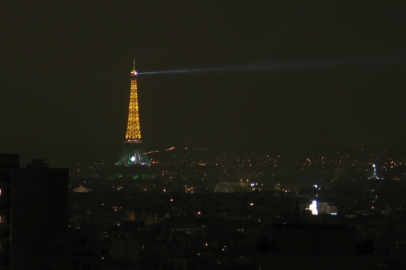 Eiffeltårnet dekorert med en stor rugbyball noen dager før VM begynte. Foto: Gaël Chardon.